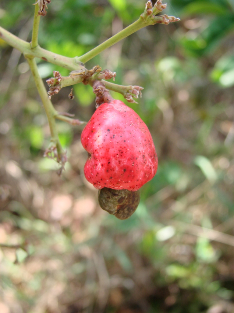 Anacardium humile - ANACARDIACEAE Jardim Botânico de Brasília - Distrito Federal - Brasil.